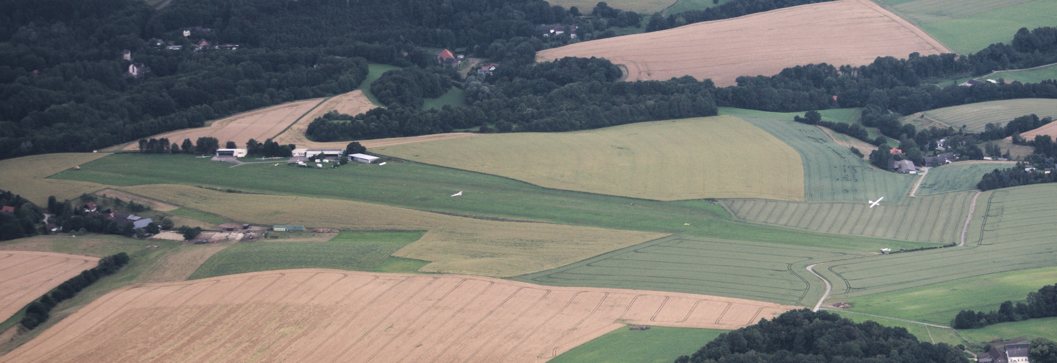 Flugplatz Meiersberg, Ratingen